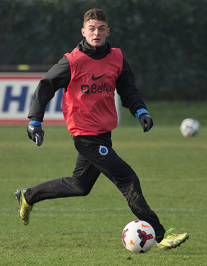 Maxime Lestienne, speler van Club Brugge